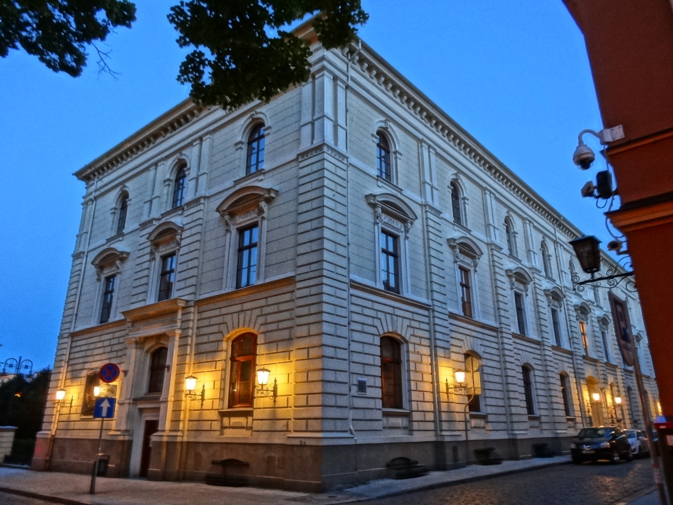 Ratusz w Bydgoszczy przy ul. Jezuickiej/Starym Rynku, dawne Kolegium Jezuickie (XVII w.)